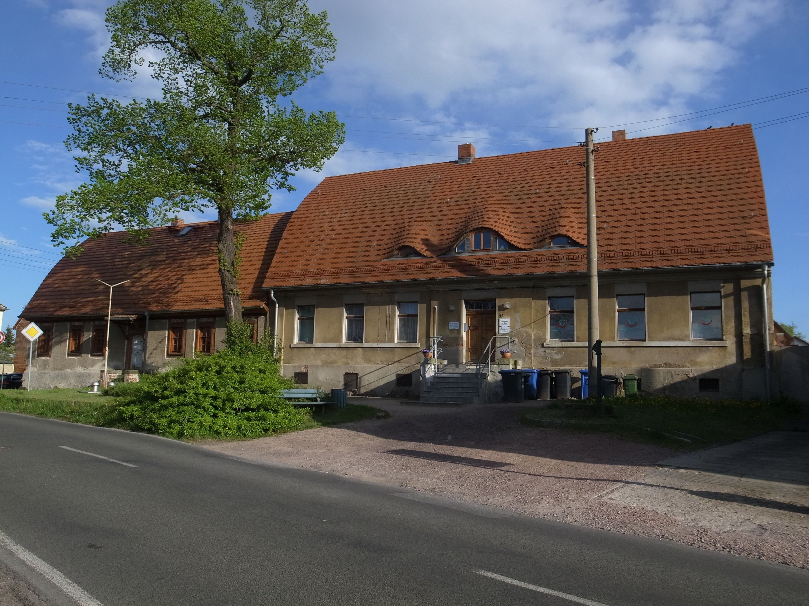 Dessau-Roßlau, Königendorfer Straße 57, 58, Gutshaus, Vorwerk Kochstedt (Baudenkmal im Denkmalverzeichniss Sachsen-Anhalt, Erfassungsnummer: 094 41074 000 000 000 000 [1])